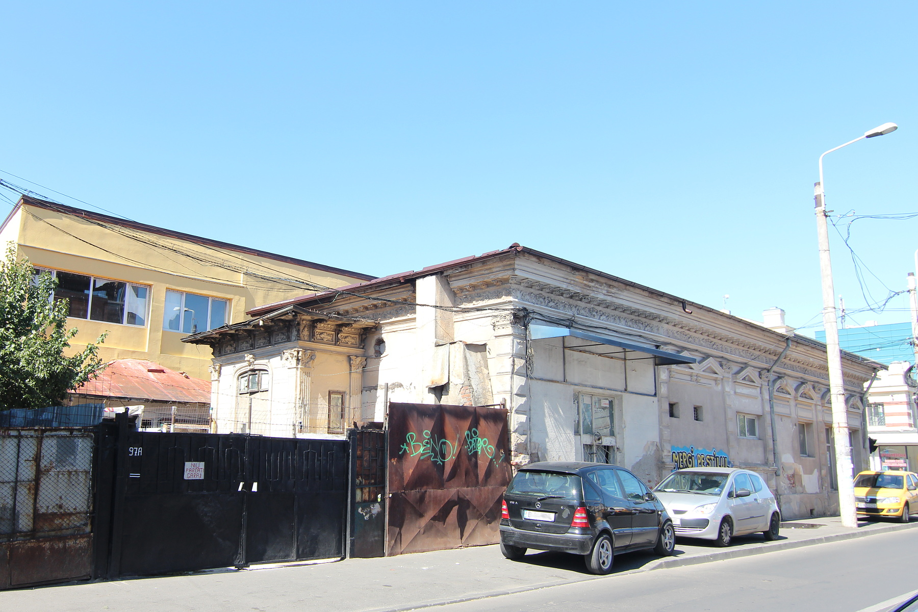 Casă pe strada Traian